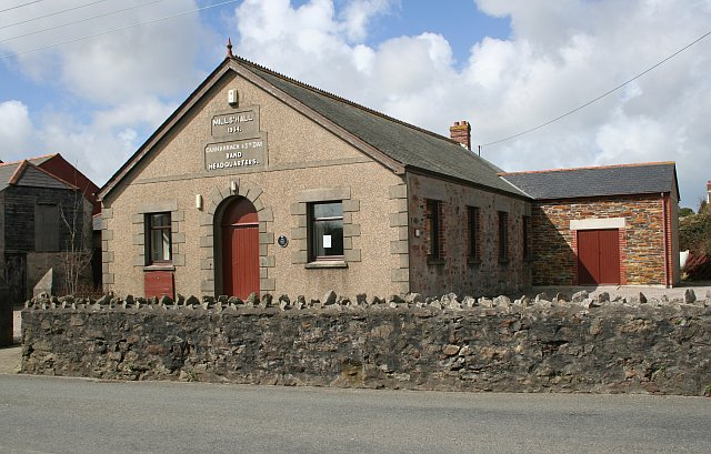 Mills Hall, Carharrack